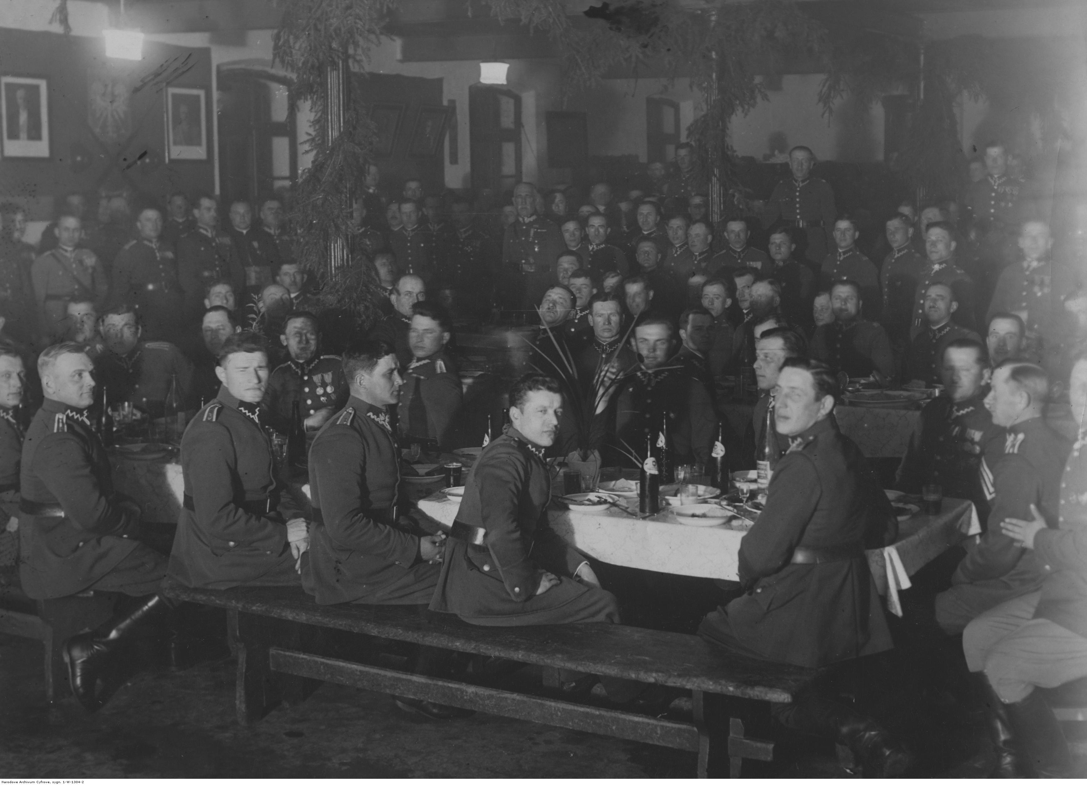 Święto 77 pułku piechoty w Lidzie - podoficerowie na sali podczas bankietu; luty 1937. Koncern Ilustrowany Kurier Codzienny - Archiwum Ilustracji. Sygnatura: 1-W-1304-2